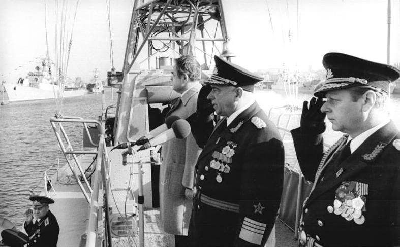 Rostock, 30. Jahrestag DDR-Gründung, Flottenparade ADN-ZB Sindermann 7.10.79 Rostock: Eine eindrucksvolle Flottenparade der Volksmarine der NVA war in Rostock Höhepunkt der Feierlichkeiten zum Republikjubiläum. Von Bord des Torpedoschnellbootes "Arvid Harnack" nahm der Stellvertreter des Ministers für Nationale Verteidigung und Chef der Volksmarine, Admiral Wilhelm Ehm (M.), gemeinsam mit dem Kommandierenden der Parade, Vizeadmiral Gustav Hesse (r.) die Paradeformation der vor Anker liegenden Schiffe ab. Auf dem Boot hatte auch Ernst Timm, 1. Sekretär der SED-Bezirksleitung Rostock, Aufstellung genommen. Abgebildete Personen: Ehm, Wilhelm: Stellvertretender Verteidigungsminister, Admiral, ZK der SED, DDR Hesse, Gustav: Konteradmiral, DDR